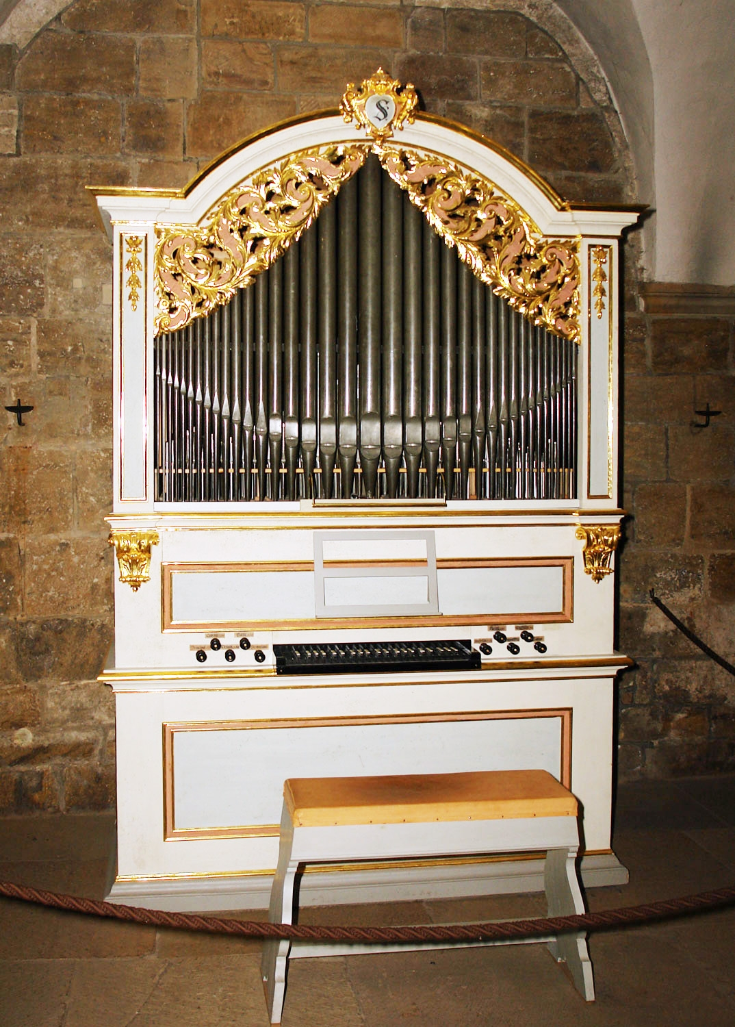 Bremer Dom: Silbermann-Orgel in der Hauptkrypta